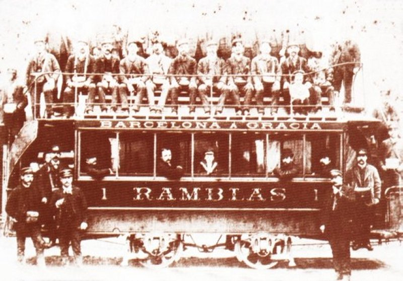 Tranvía Barcelona-Gracia (1872).